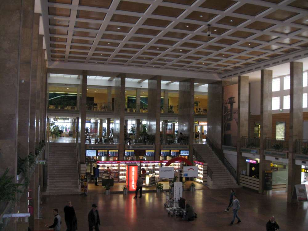 Ferihegy 1. terminál, a várócsarnok belseje